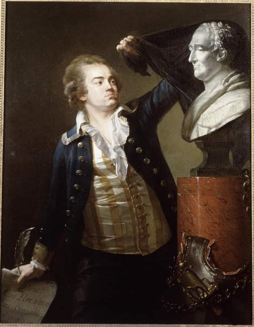 Trophime-Gérard dévoilant le buste de son père-Robin-IMG 2334.JPG